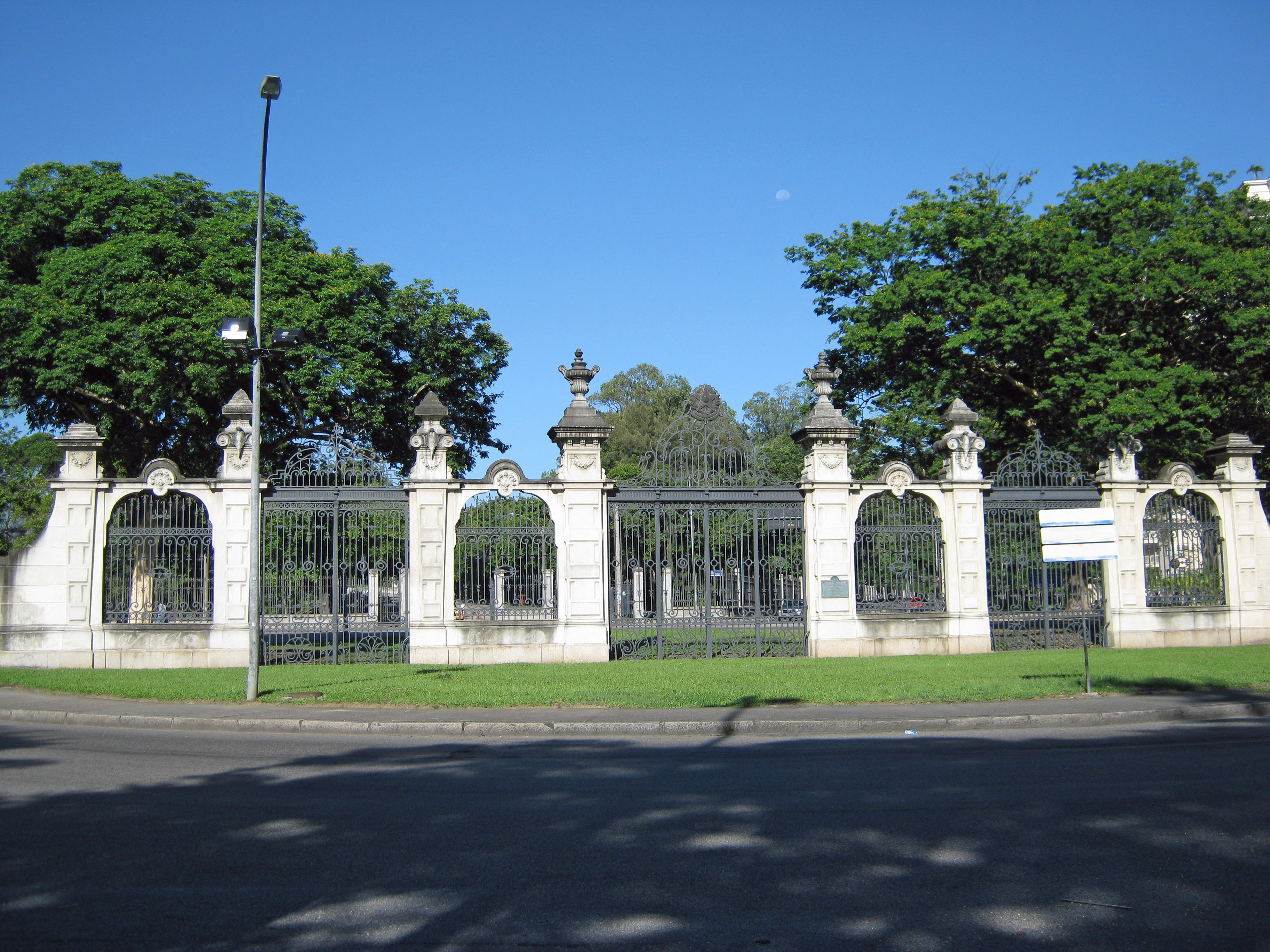 Portões artísticos de serralharia da antiga entrada principal da Quinta da Boa Vista.